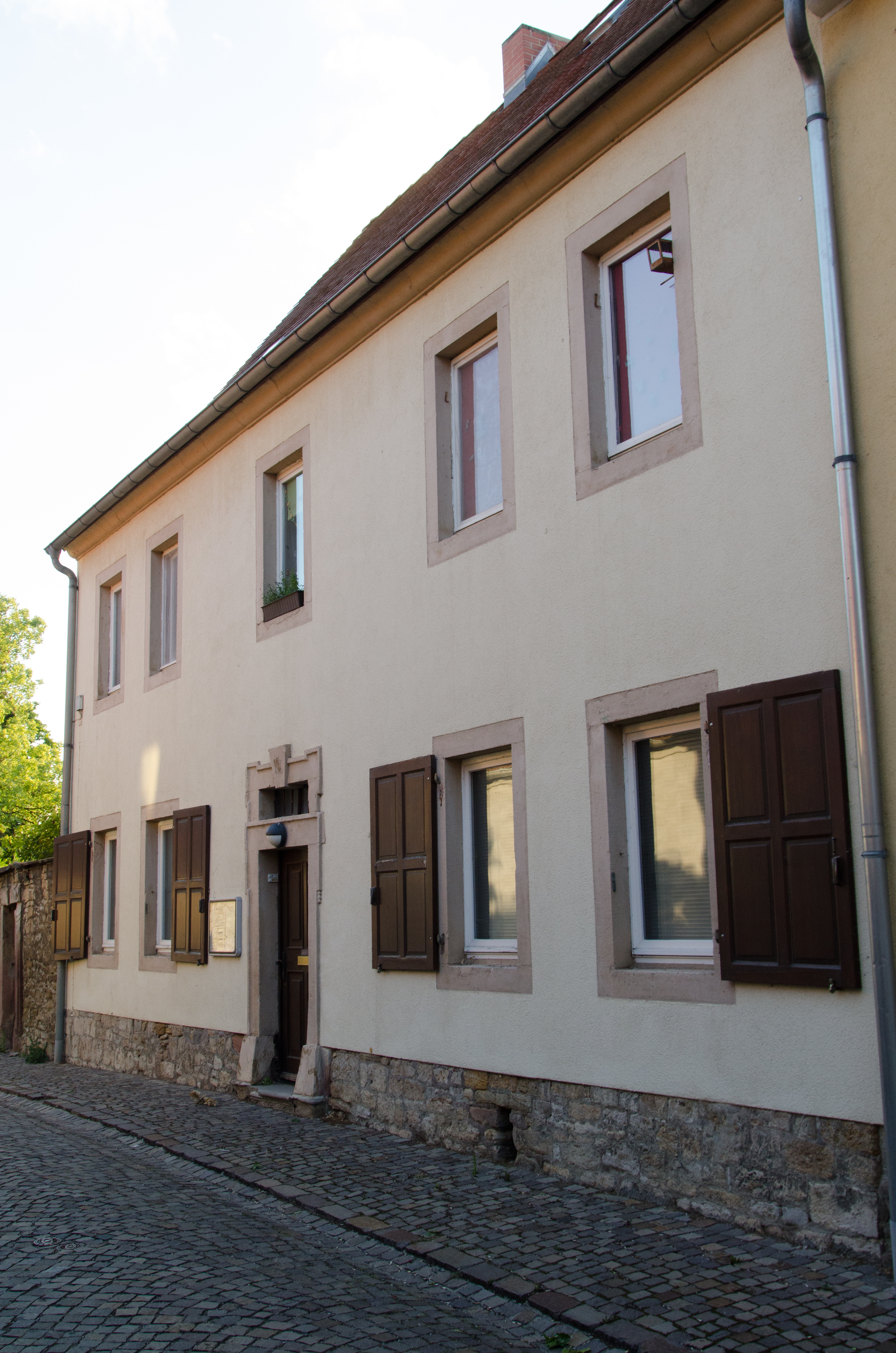 Querfurt, Burgstraße 10